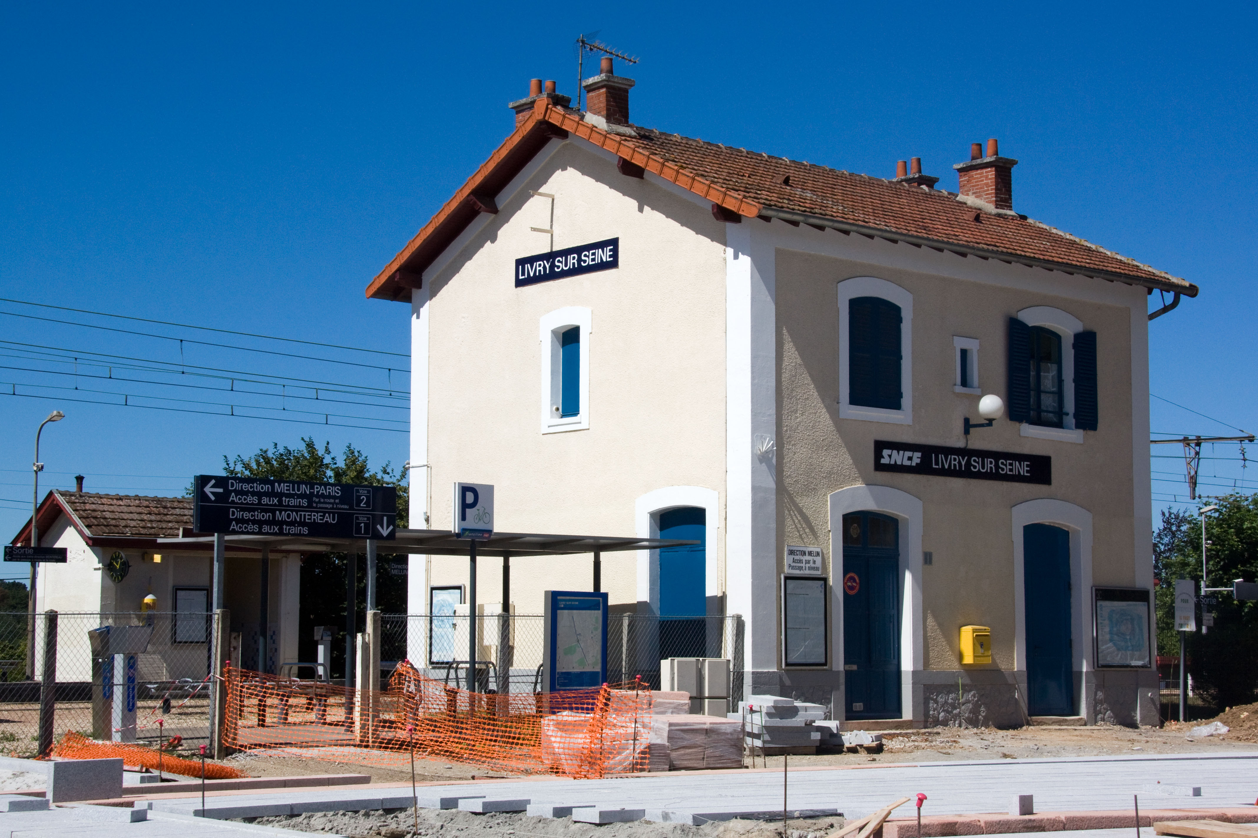 Gare de Livry-sur-Seine, Livry-sur-Seine, Seine-et-Marne, France